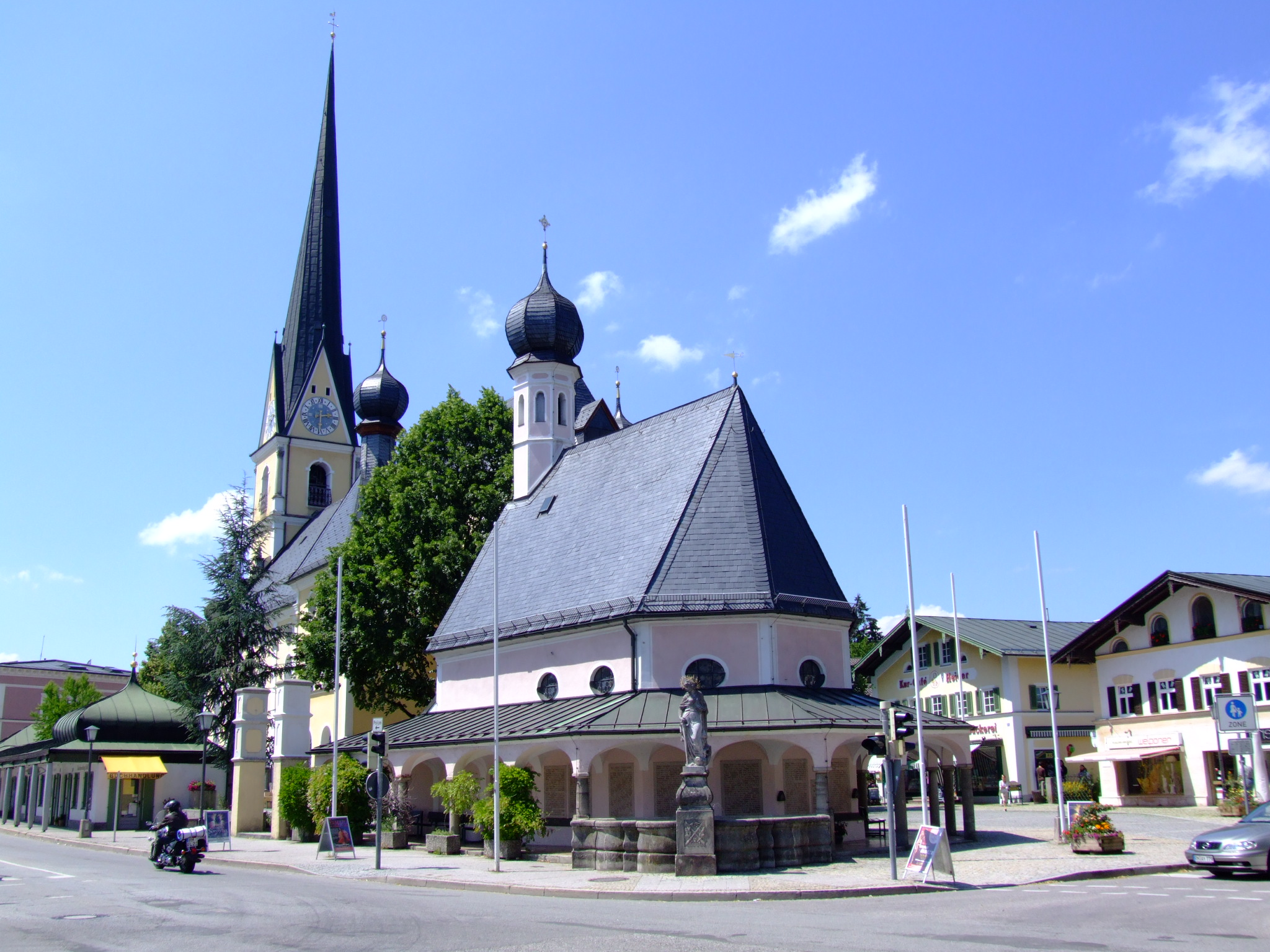 Prien Kirche Marktplatz